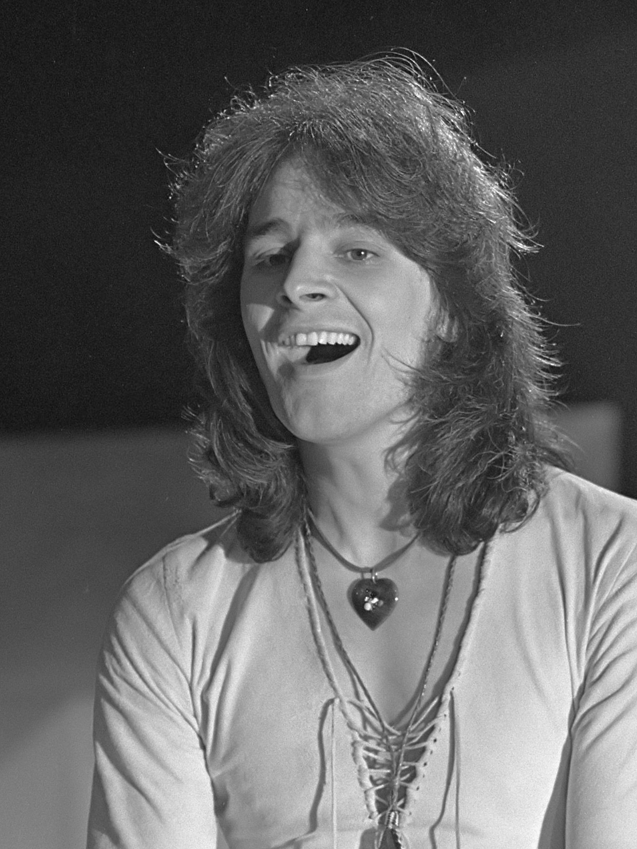 Zanger Colin Blunstone in het muziekprogramma Toppop 12 januari 1973